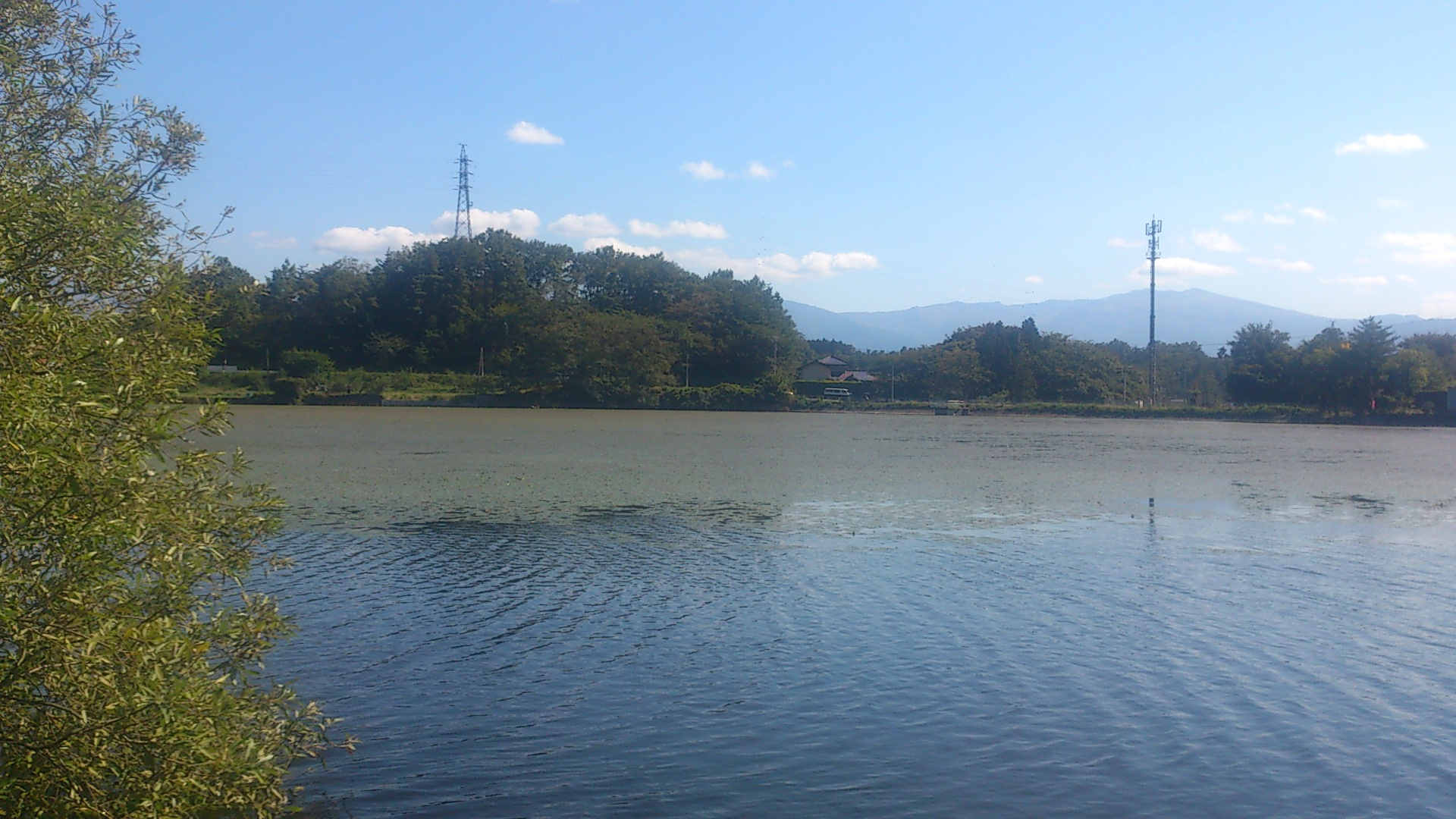 田子池（長野市田子）